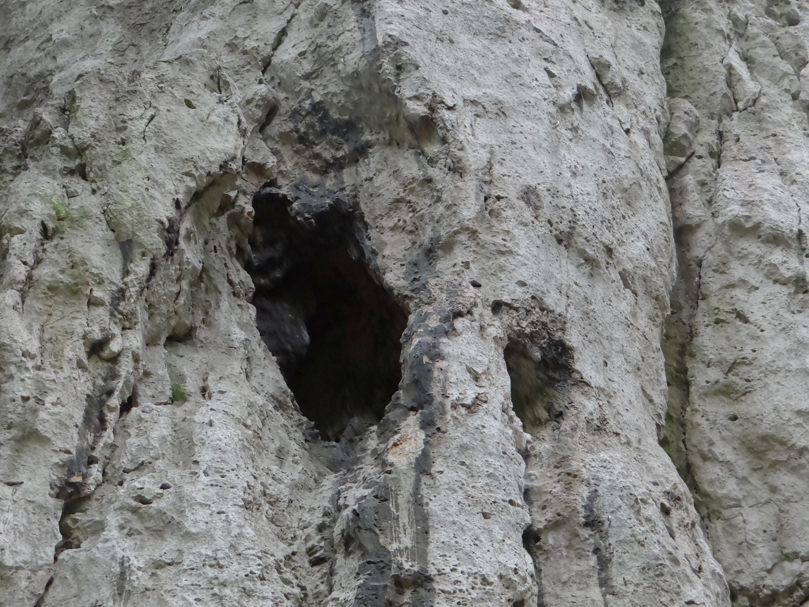 Tunel z Progami w skale Organy w Wąwozie Ostryszni